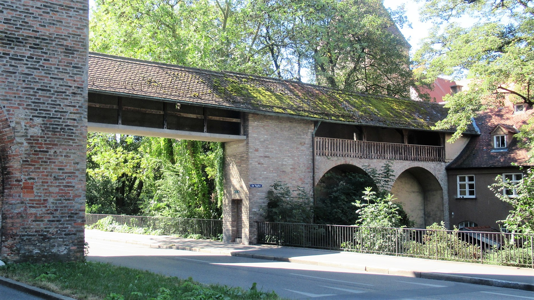 Augsburg-Jakobervorstadt: Stiliisierter Wehrgang neben dem Turm des Vogeltors (Ansicht von Norden).